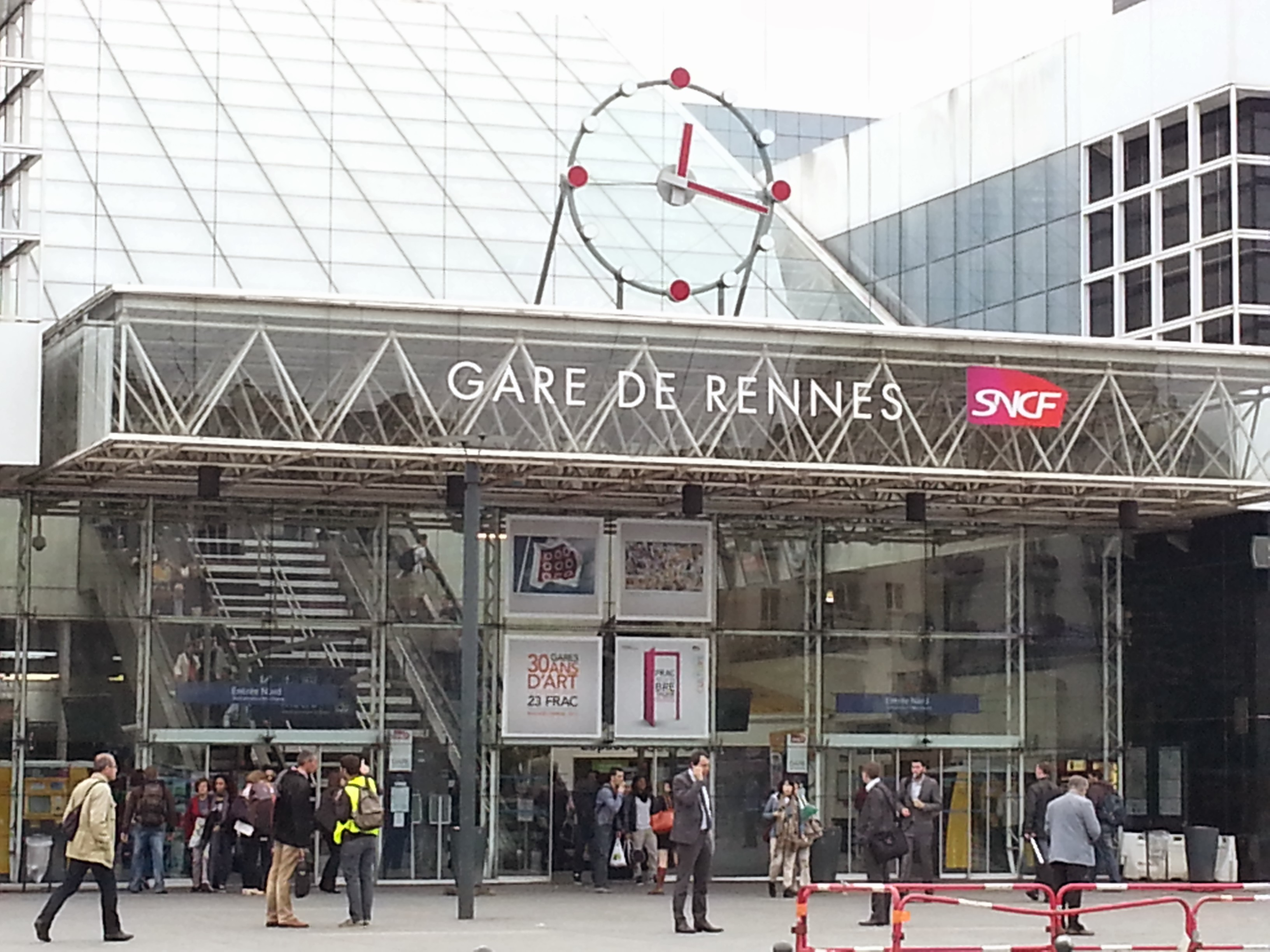 départ d'un Rennes-Nantes